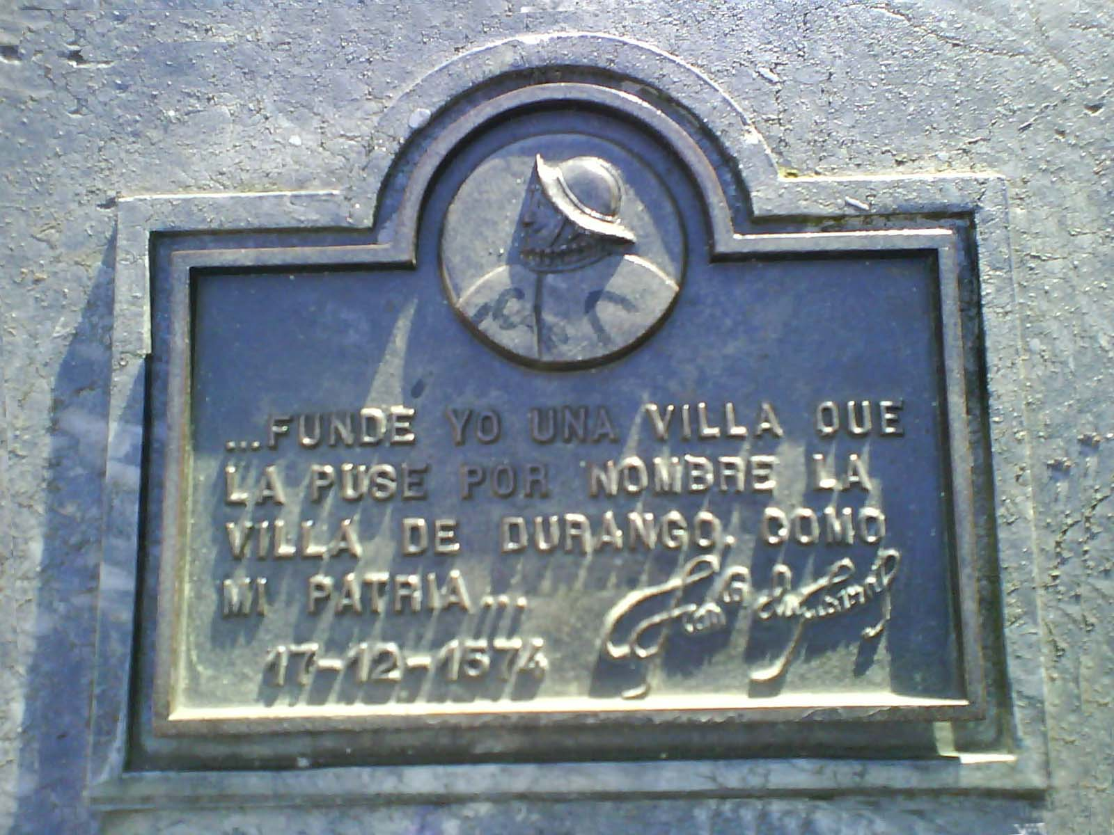 Placa del monumento a los tres Durangos en Durango, Vizcaya (País Vasco, España). Con el texto "Funde yo una villa que la puse por nombre la villa de Durango. Como mi patria..."